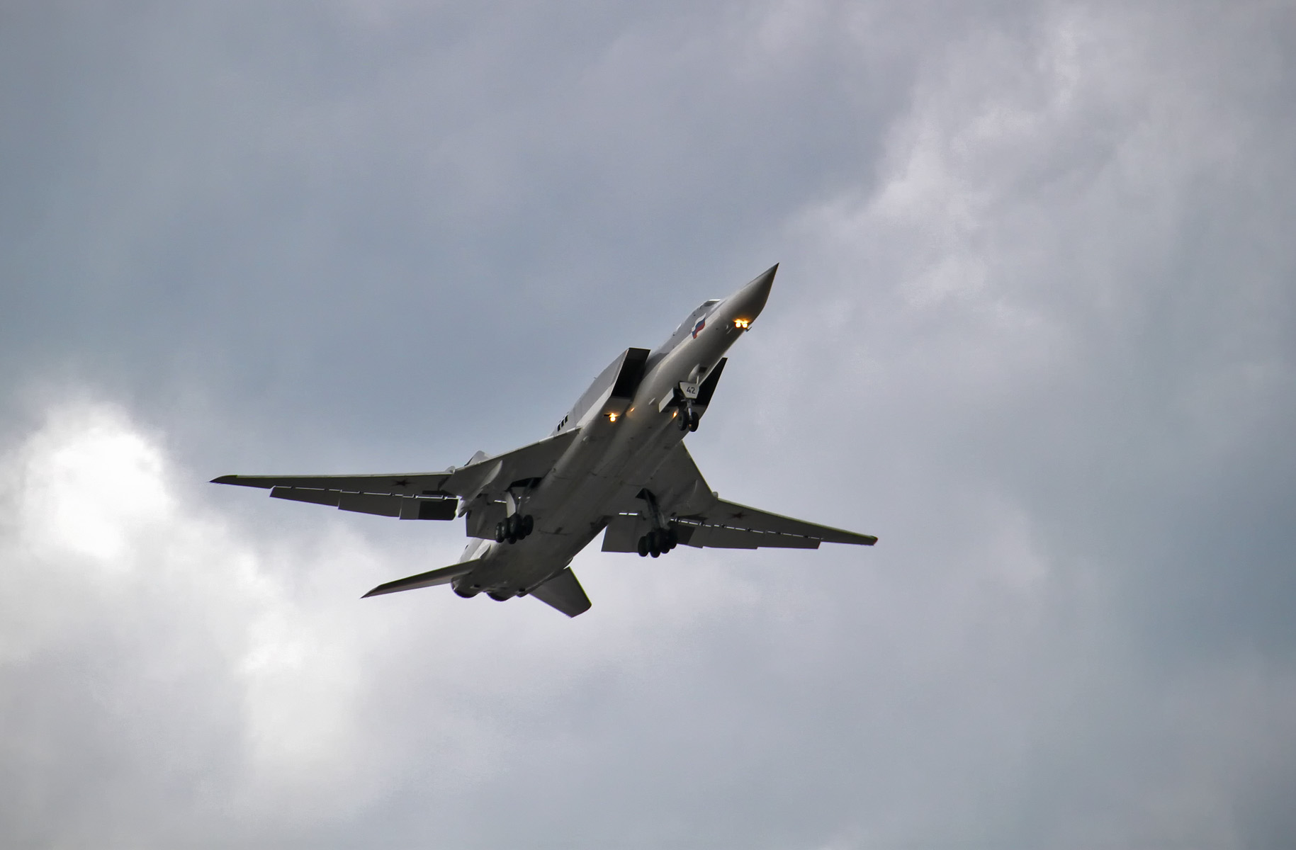 Ту-22М3 заходит на посадку на аэродром Дягилево, Рязань.